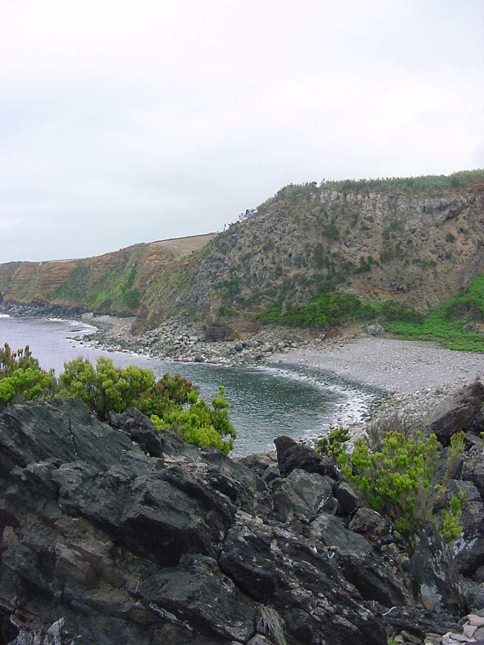 Enseada da Reserva Natural da Alagoa da Fajãzinha, ilha Terceira, Açores, Portugal.